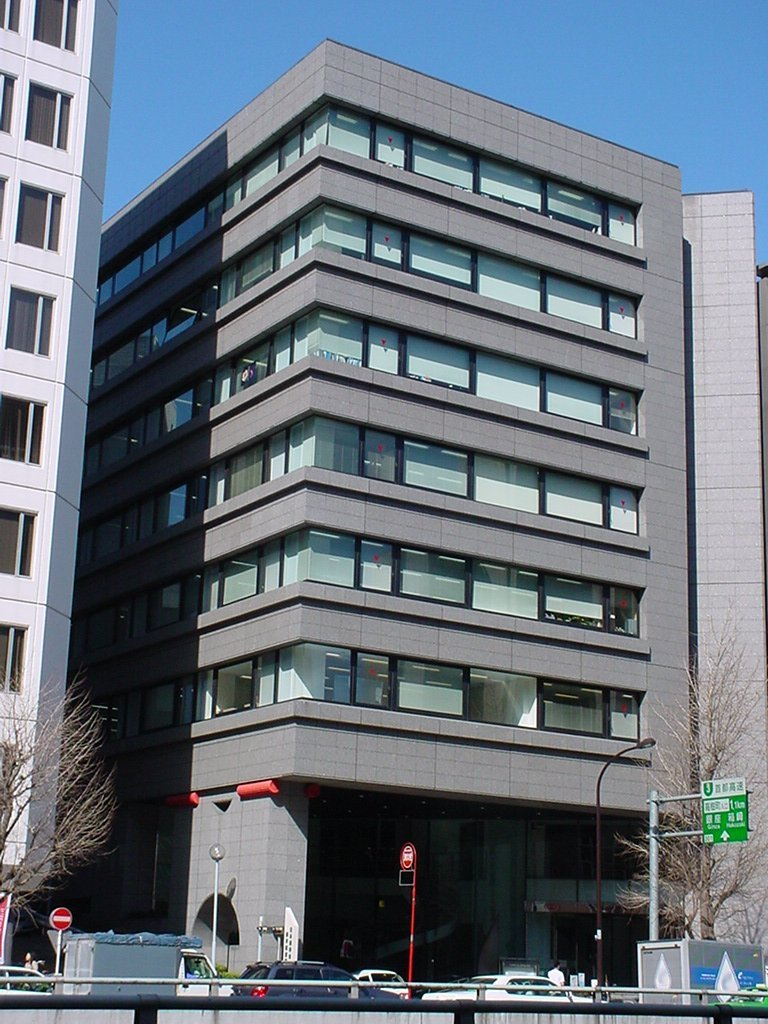 Nagai Memorial Hall (Aoyama, Tokyo)